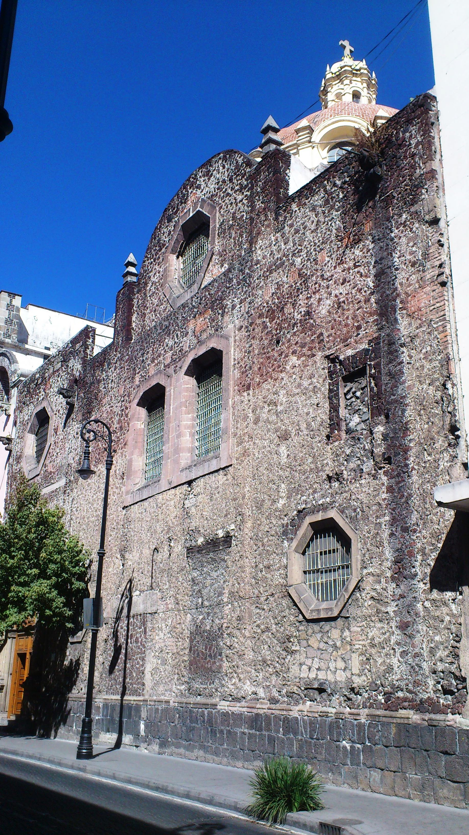 Capilla del antiguo noviciado de San Agustín en el Centro histórico de la ciudad de México